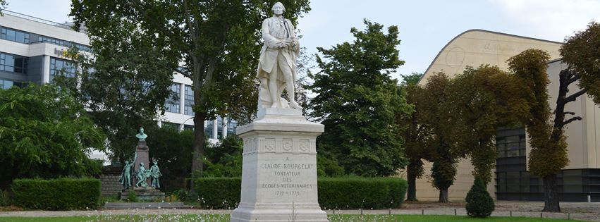 Vue de la cour d'honneur de l'Ecole nationale vétérinaire d'Alfort